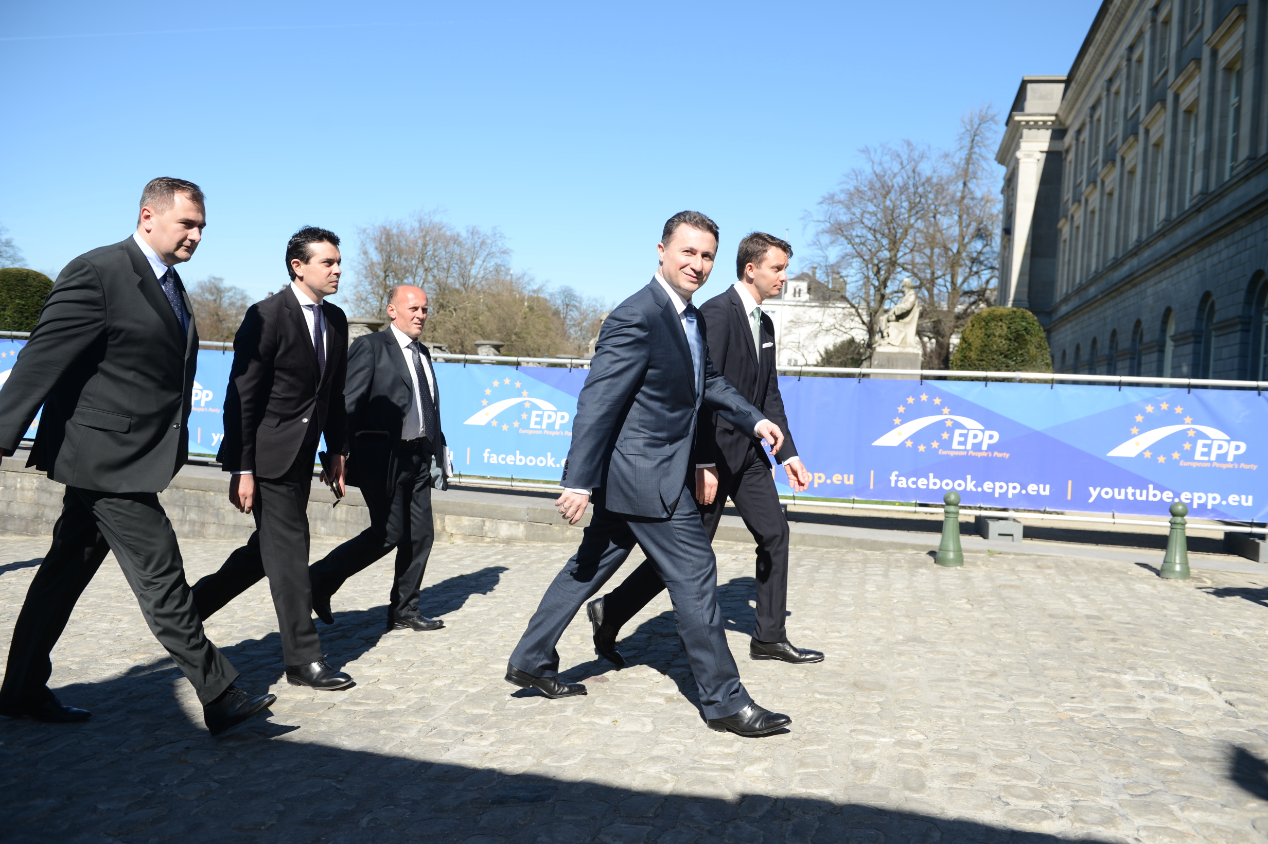 EPP Brussels Summit; Mar. 2014